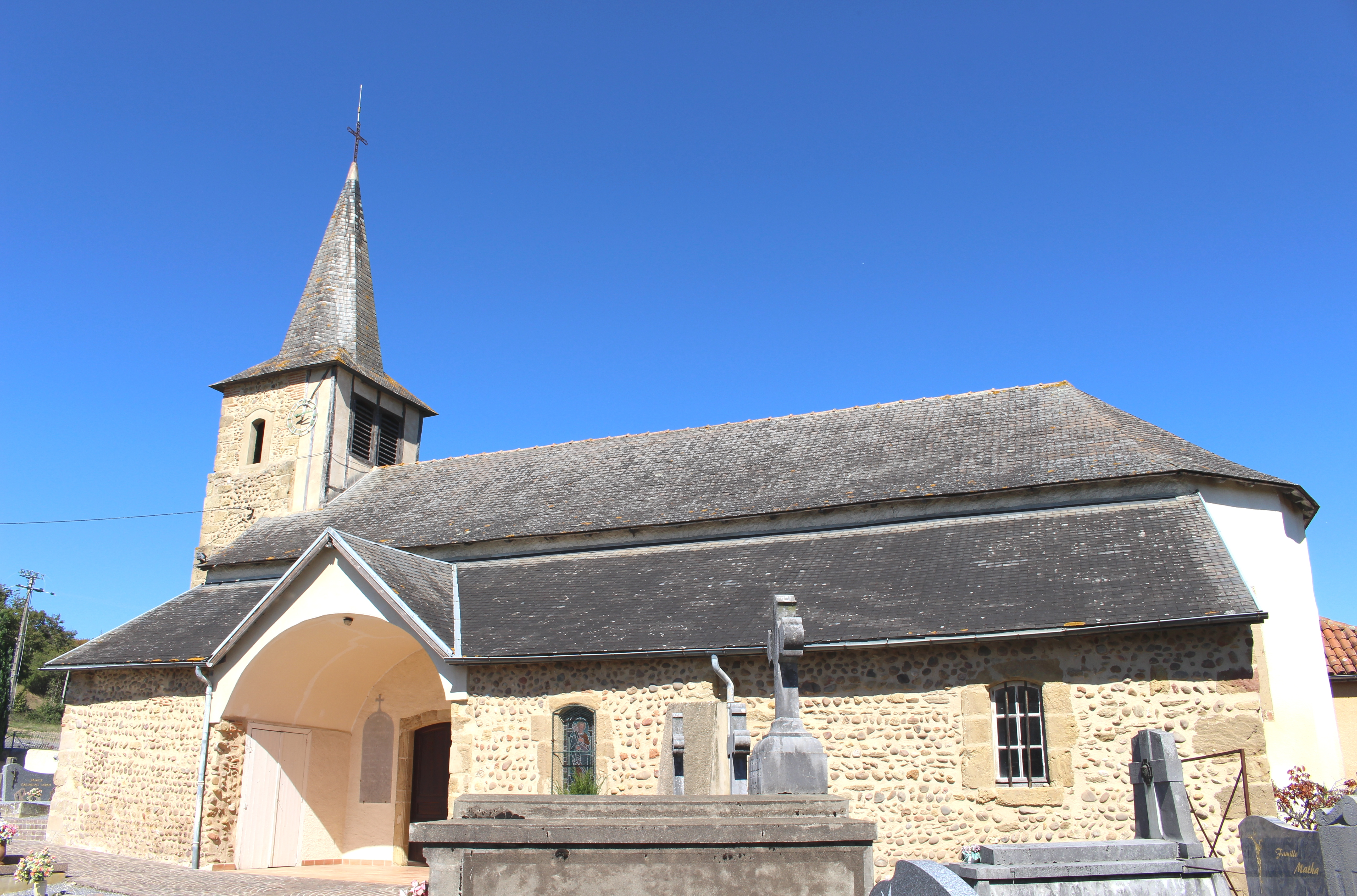 Église Saint-Michel de Vidou (Hautes-Pyrénées)